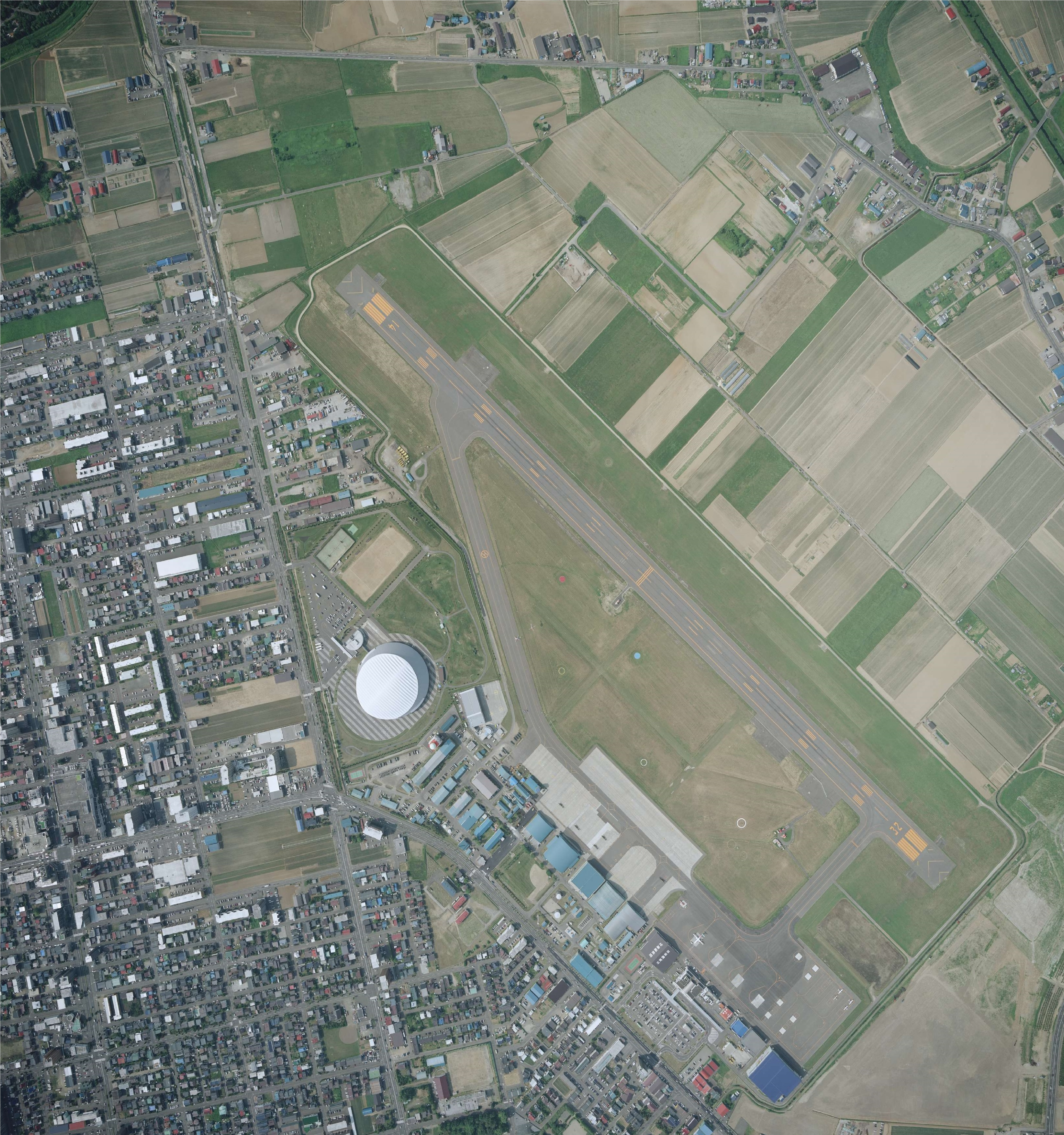 札幌飛行場（丘珠空港）の空中撮影写真（2008年）